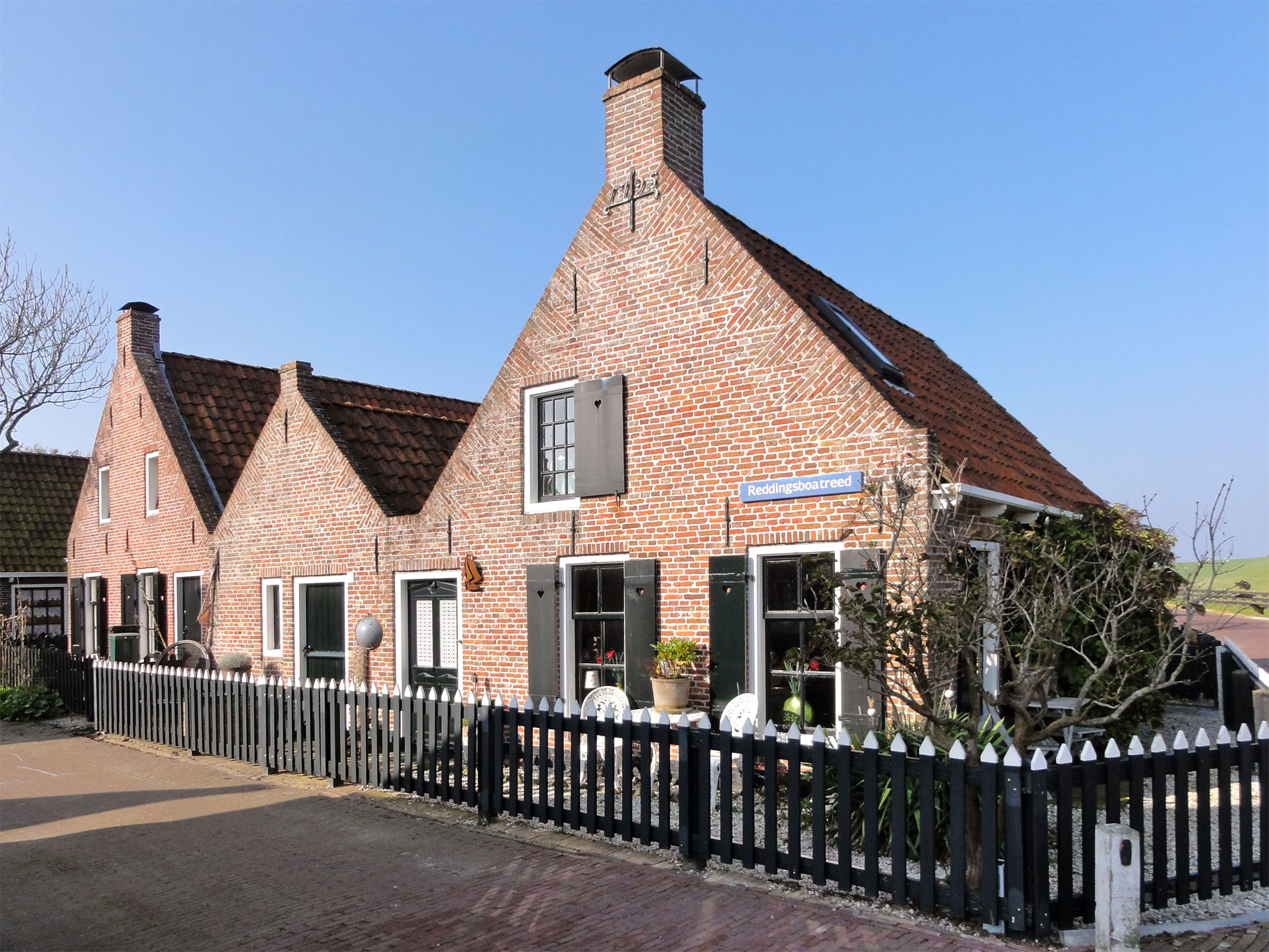 Woning aan de Reddingsboatreed 2 in Moddergat